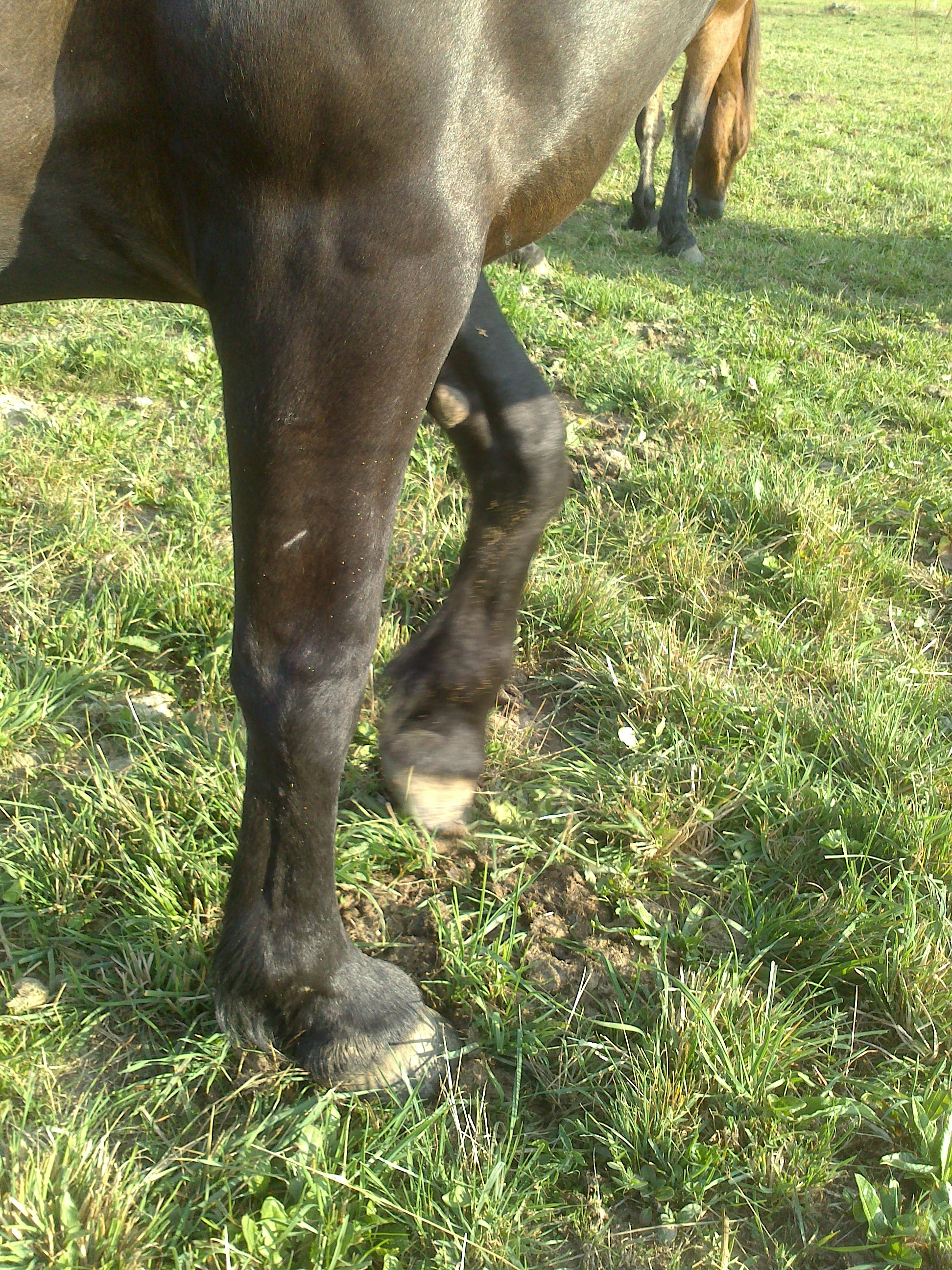 Cheval Barraquand à Autrans (Isère, Rhône-Alpes, France)